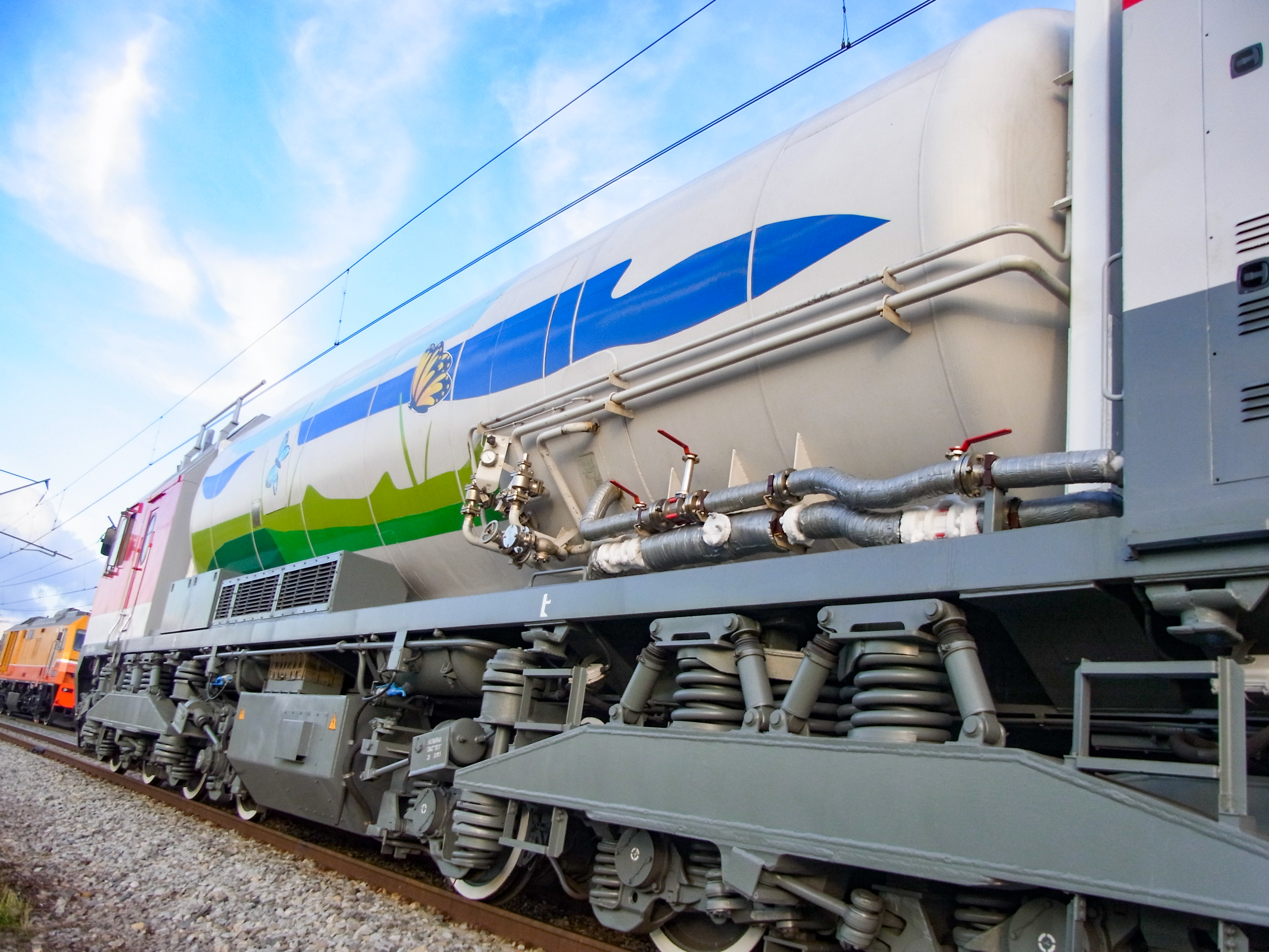 Топливная ёмкость газотурбовоза ГТ1h-002 на выставке Экспо-1520, кольцо ВНИИЖТ, Щербинка, Москва